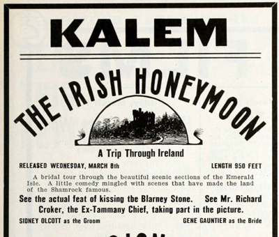 Publicité parue dans The Index